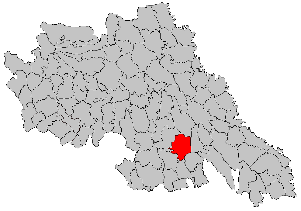 Categorie:Hărţi ale judeţului Iaşi